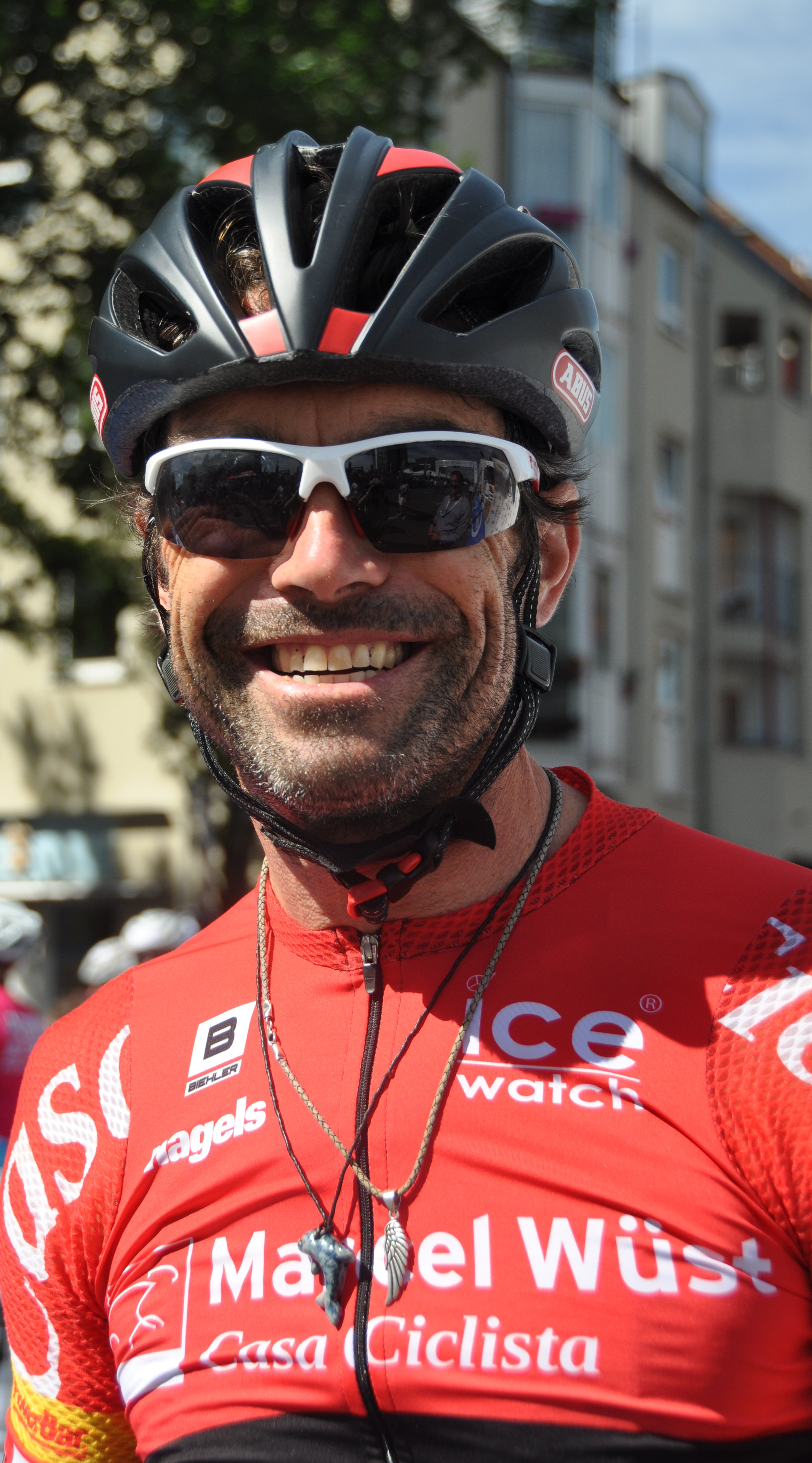 Marcel Wüst, ehemaliger deutscher Radrennfahrer